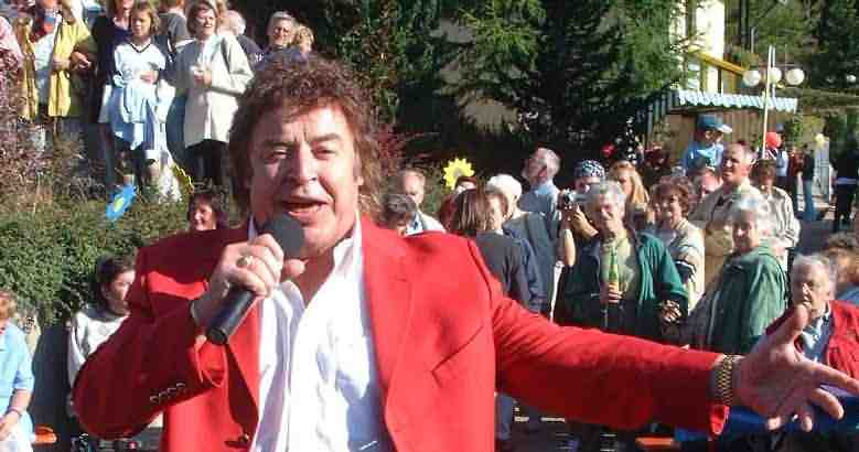 Tony Marshall bei einer Benefizveranstaltung 2003